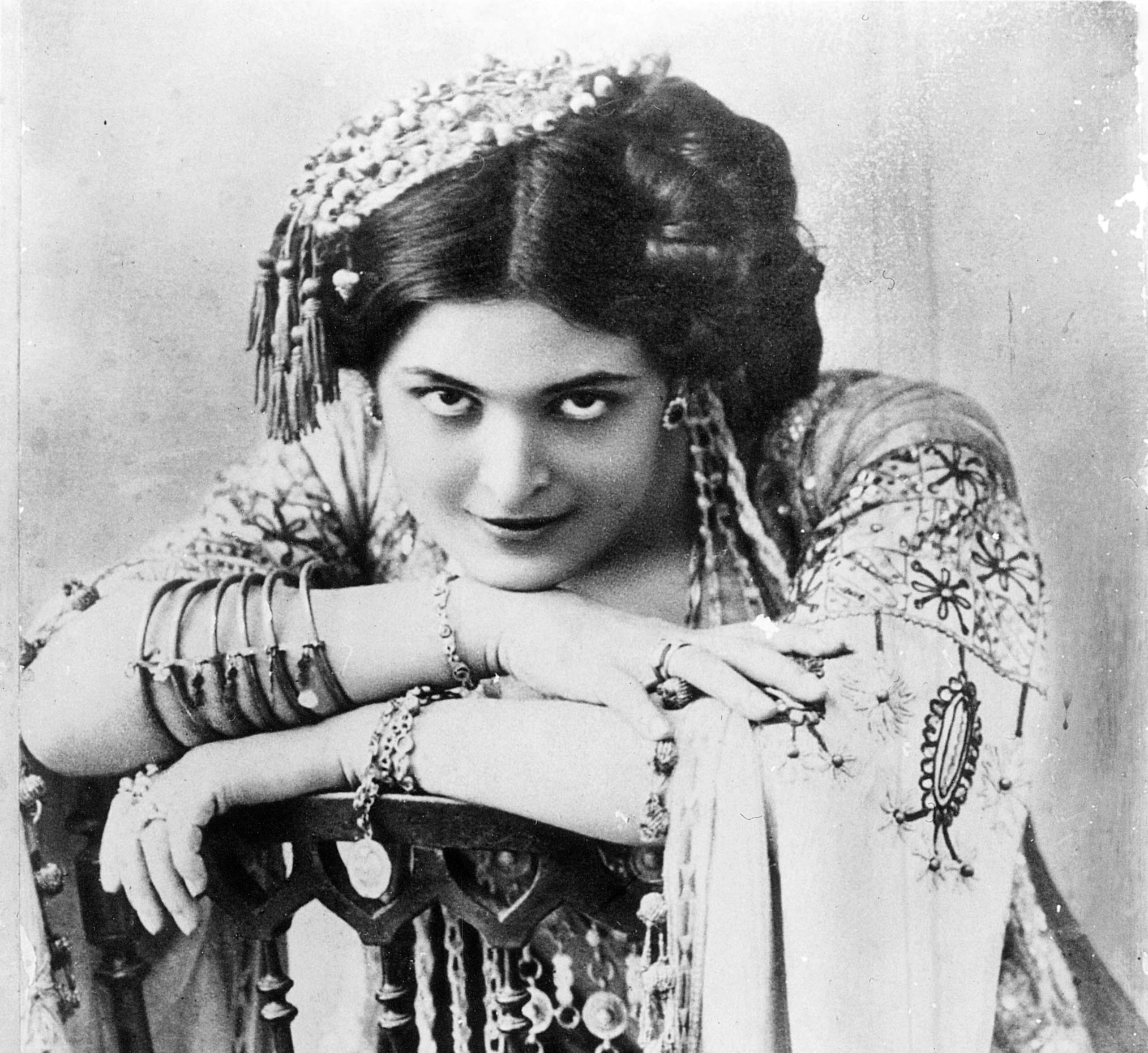 Gea della Garisenda